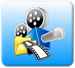 Logo van DCP™